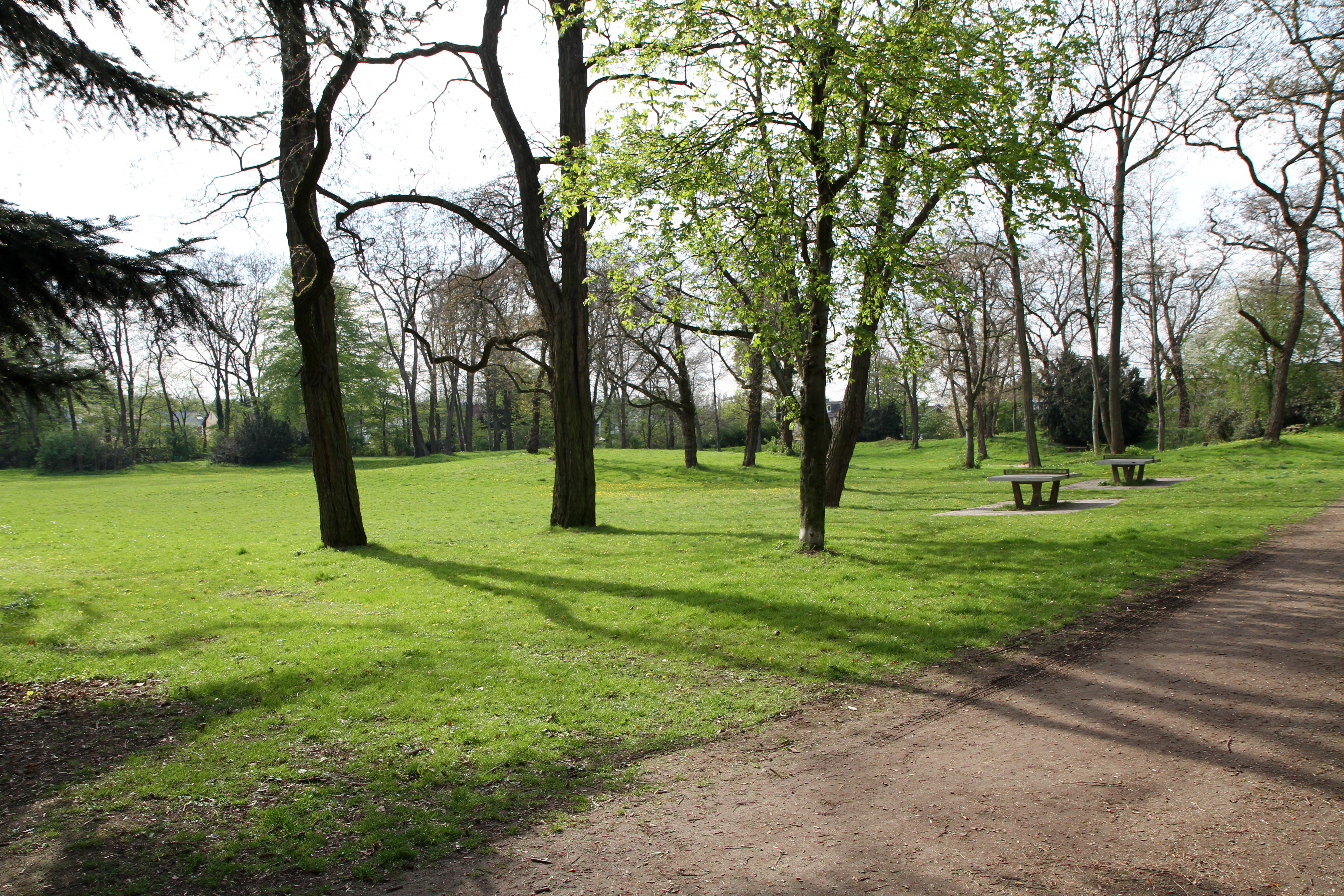 Köln-Mülheim, Teilbereich derdenkmalgeschützten Grünanlage in der Bruder-Klaus-Siedlung